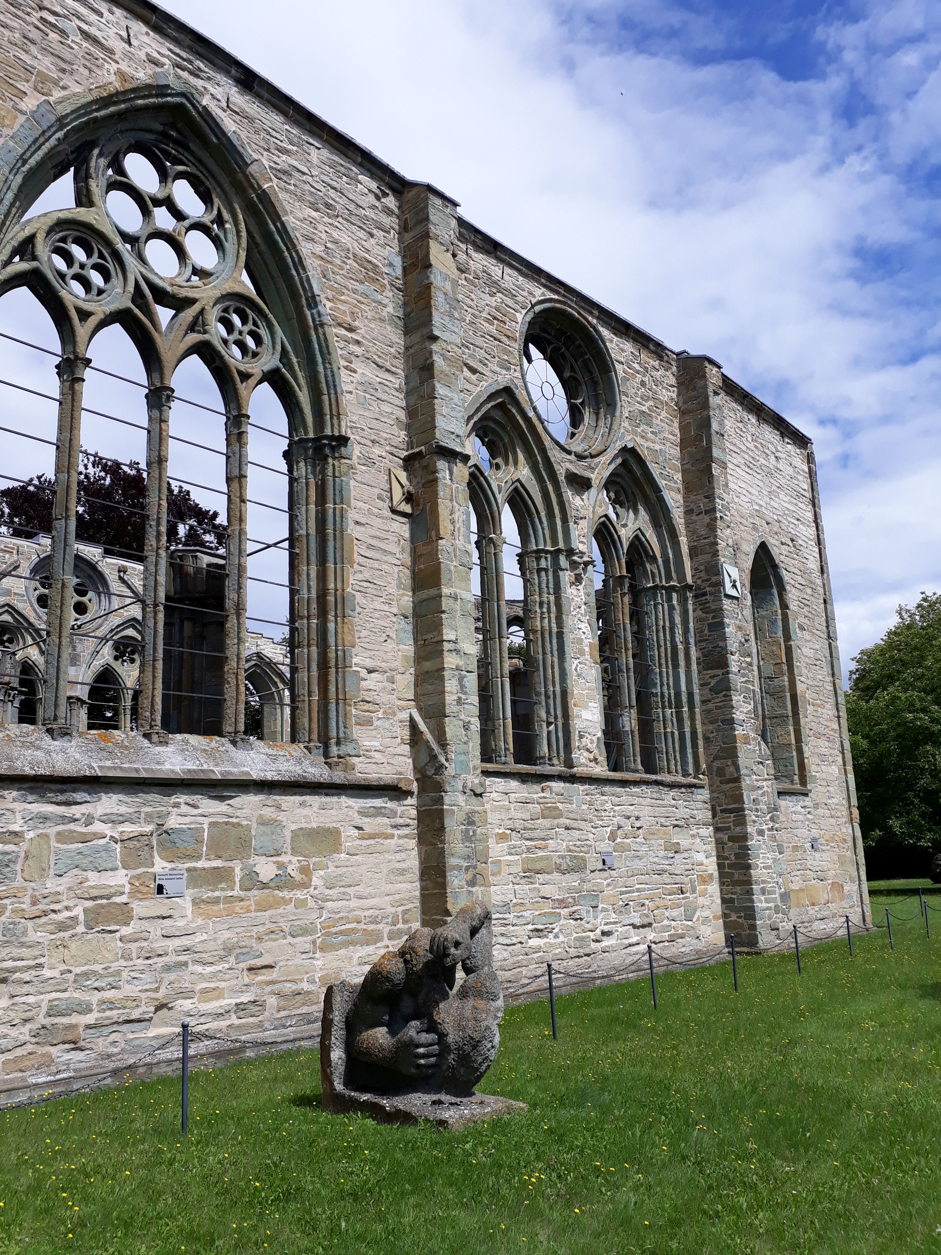 Kleine Marienkirche Lippstadt